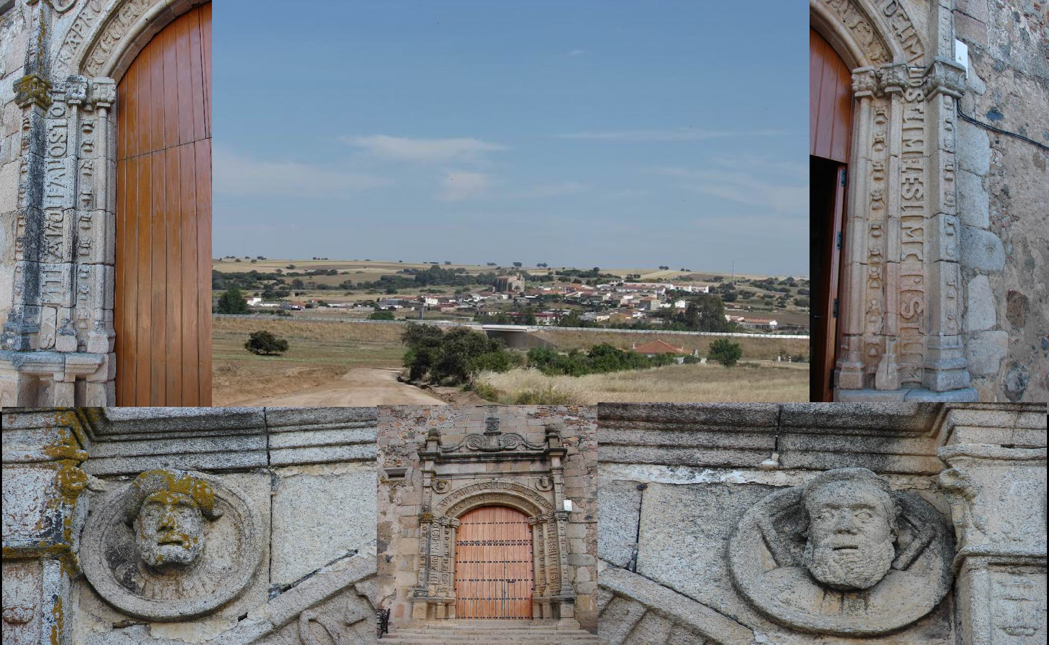 Vèneto: Vista de Aljucén